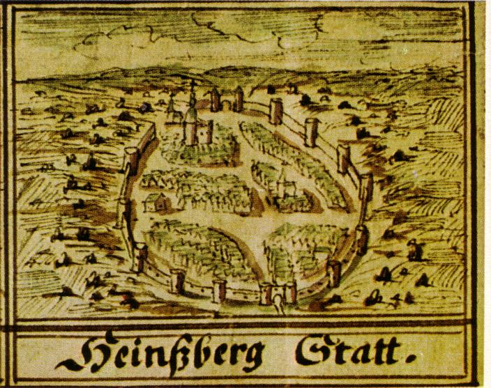 Heinsberg